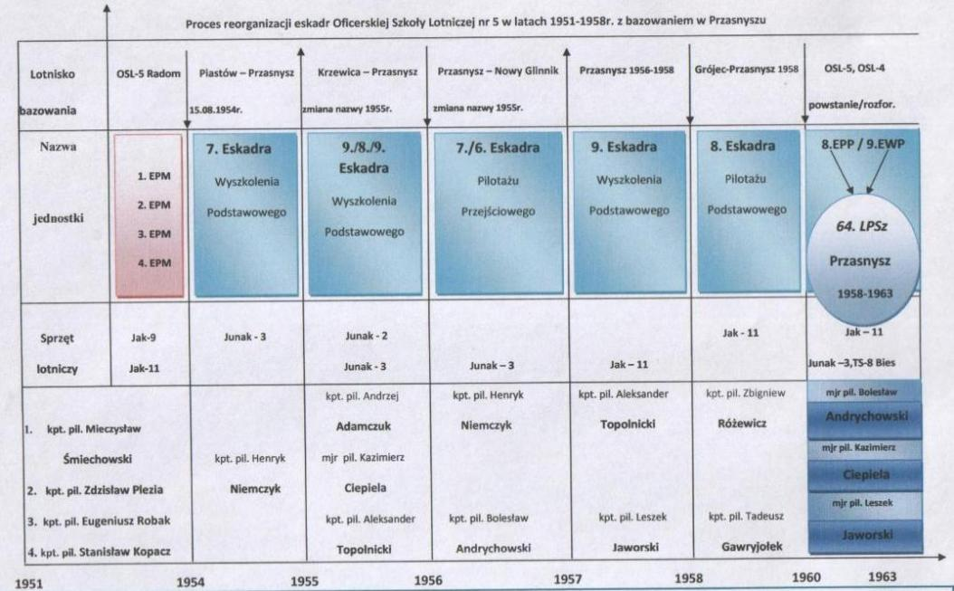 Proces reorganizacji eskadr OSL nr 5 w latach 1951 - 1958